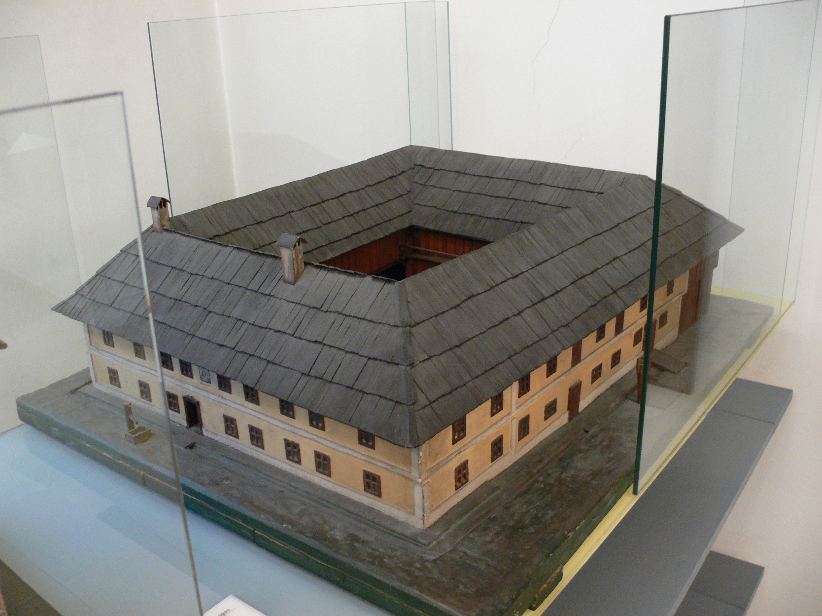 Wien, Österreichisches Museum für Volkskunde Modell eines oberösterreichischen Vierkanthofs